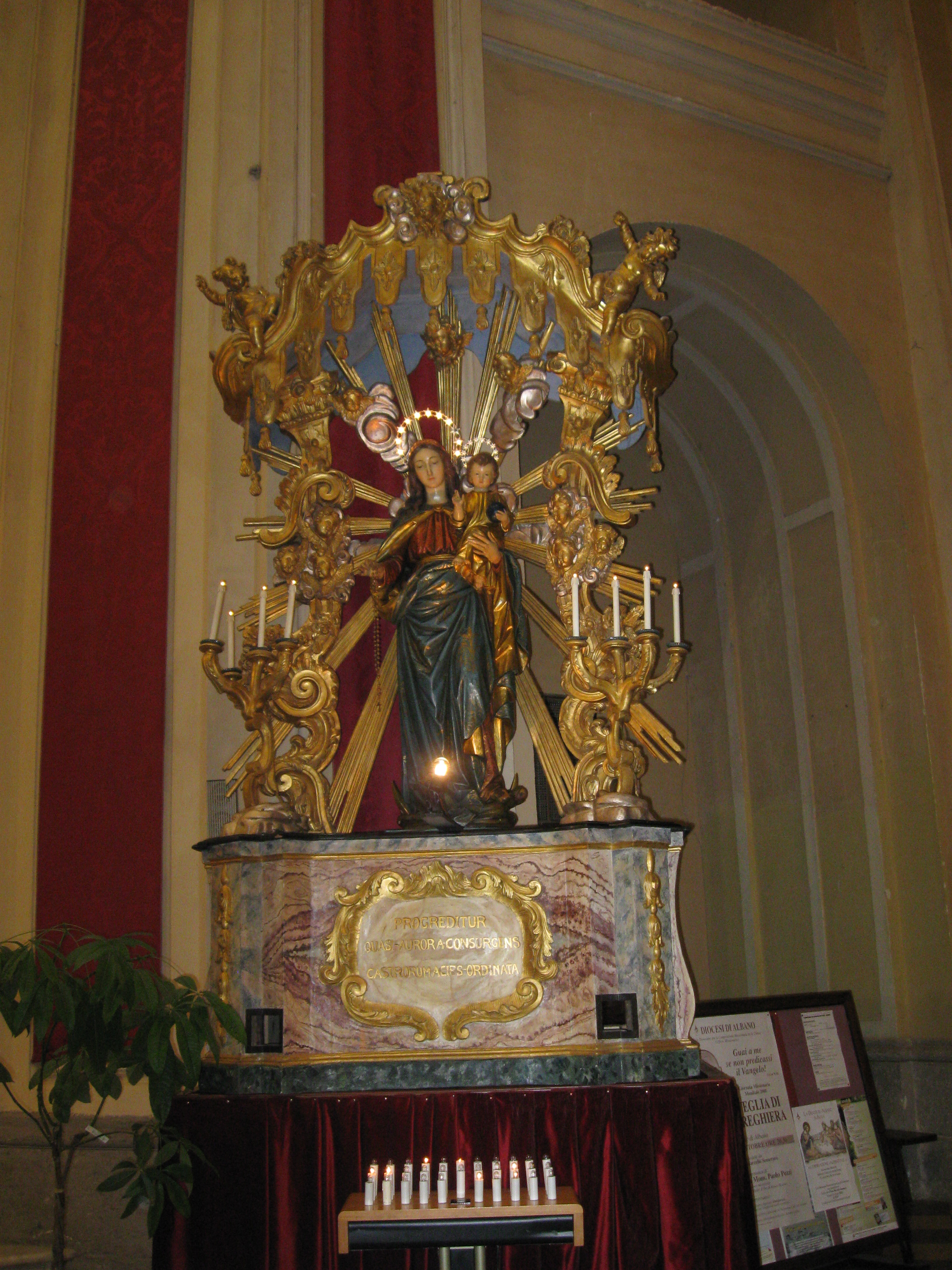 La statua della Madonna del Rosario di Marino (RM)